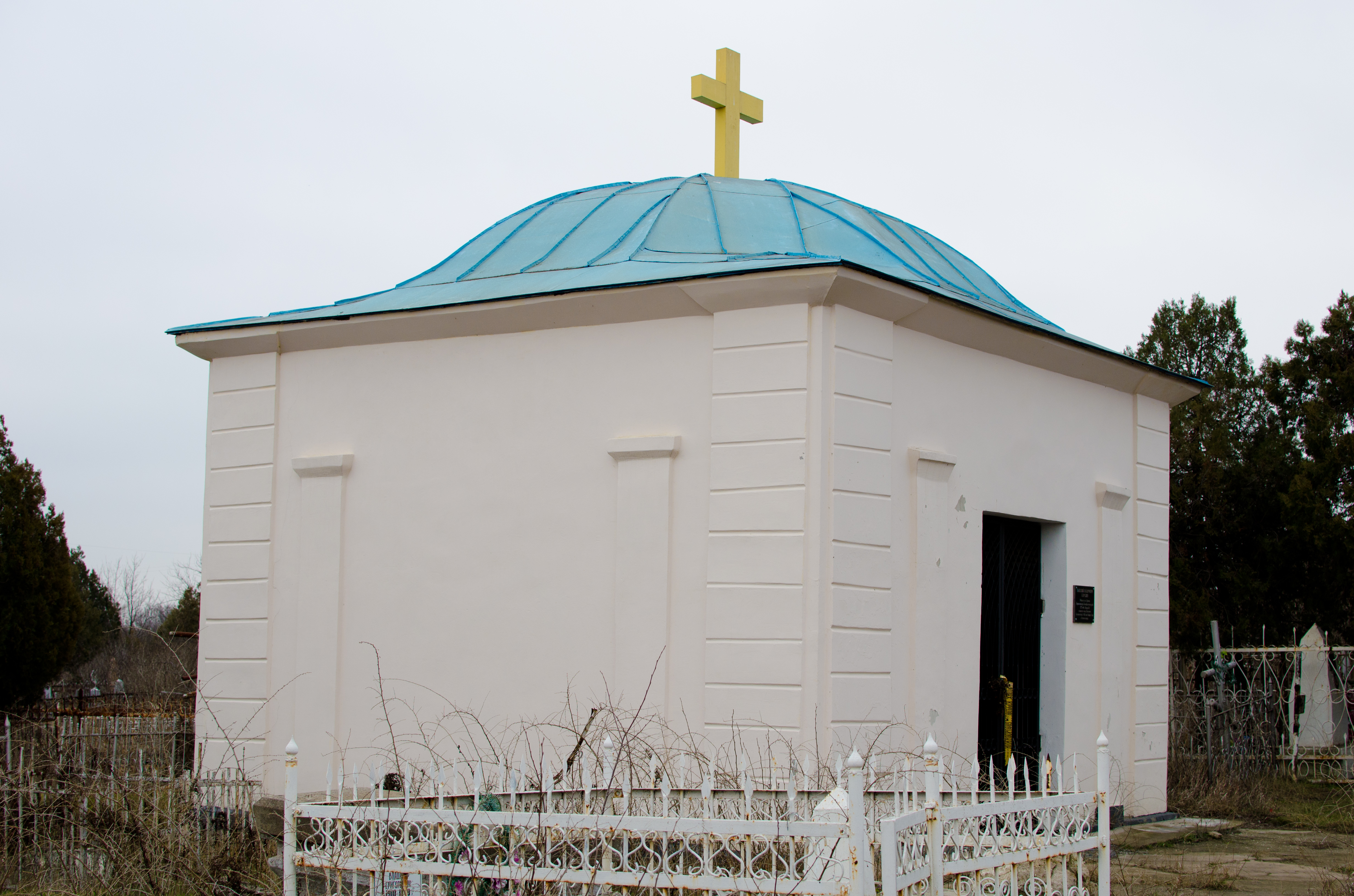 Mykolaiv_Spring_2013_67.jpg: Склеп Каразіна Василя Назаровича (1773–1842). Некрополь (старе кладовище), місто Миколаїв. This photograph was taken with a camera of Wikimedia Ukraine Цю фотографію було зроблено в рамках Вікіекспедиції «Миколаївський некрополь».